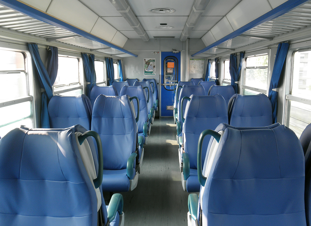 Interno di una carrozza tipo MDVC di seconda classe di Trenitalia